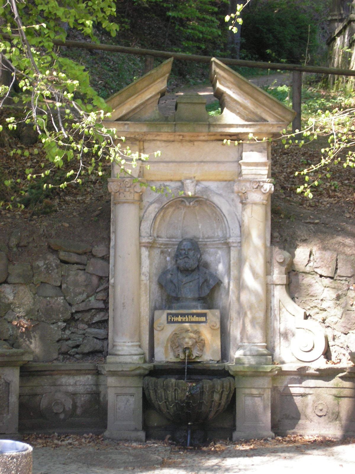 Friedrich-Hofmann-Denkmal (Denkmalbrunnen) in Ilmenau, Thüringen; errichtet 1892 zu Ehren des Schriftstellers Friedrich Hofmann (1813-1888)